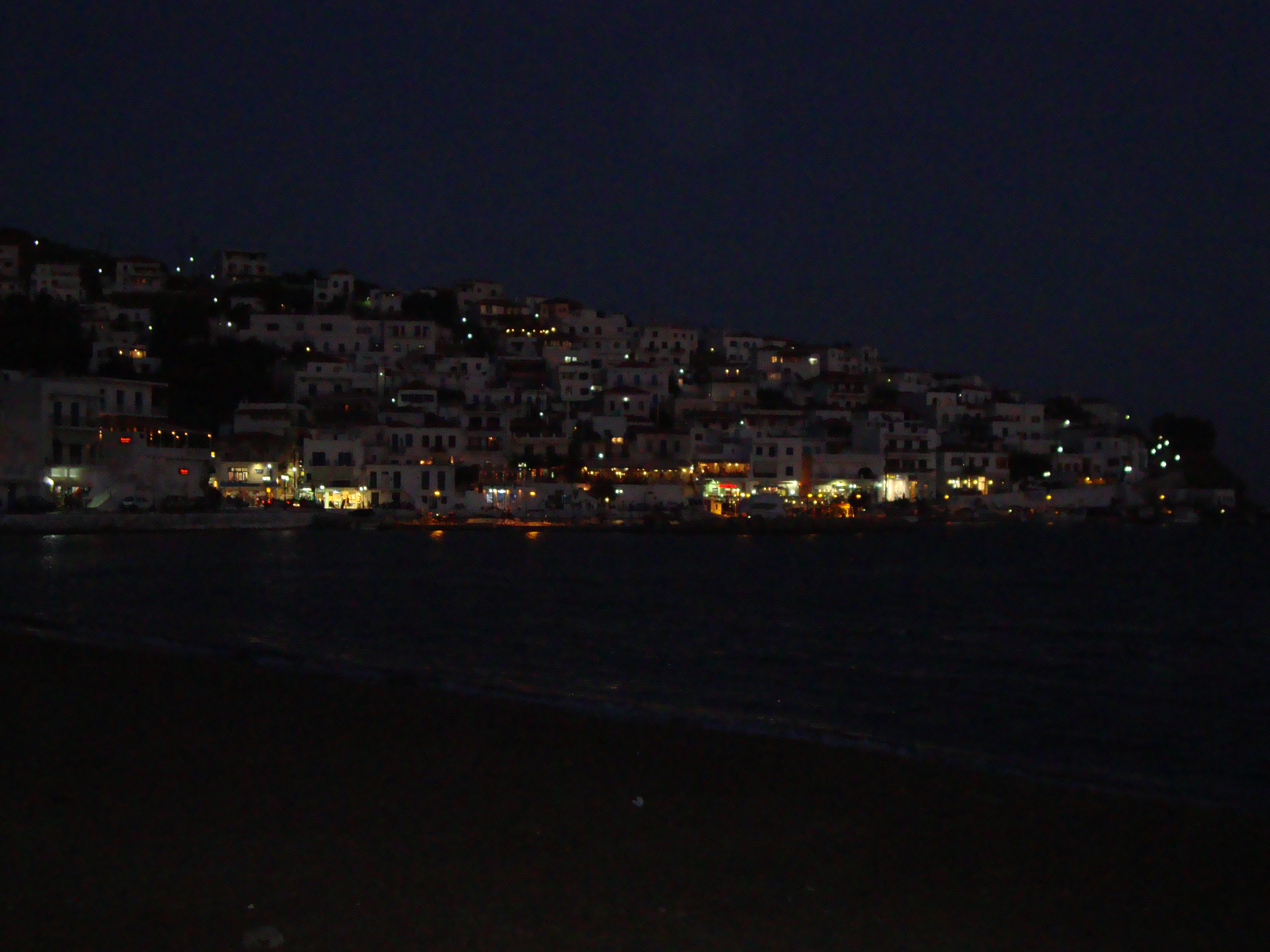 Νύχτα στο Μπατσί Άνδου